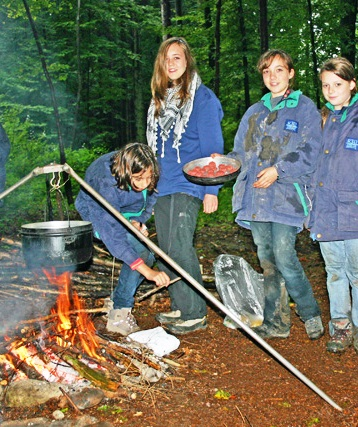 Schweizerische Kadettentage 2008 Winterthur Kadetten Horgen am Kochwettkampf